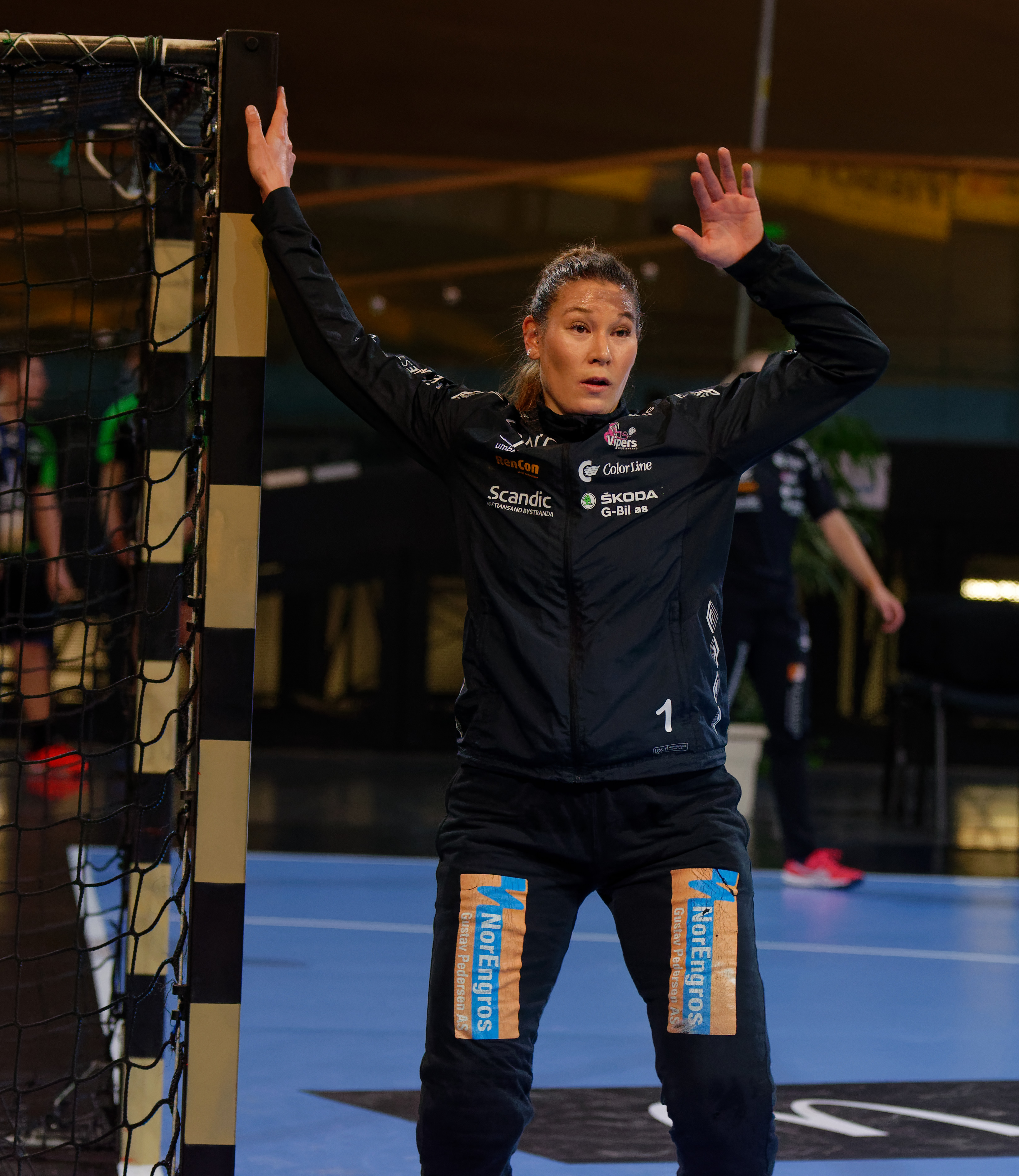 Rencontre du tour principal de coupe EHF entre Issy Paris Hand et les norvégiennes de Vipers Kristiansand au vélodrome de Saint-Quentin en Yvelines, le 03 février 2018.